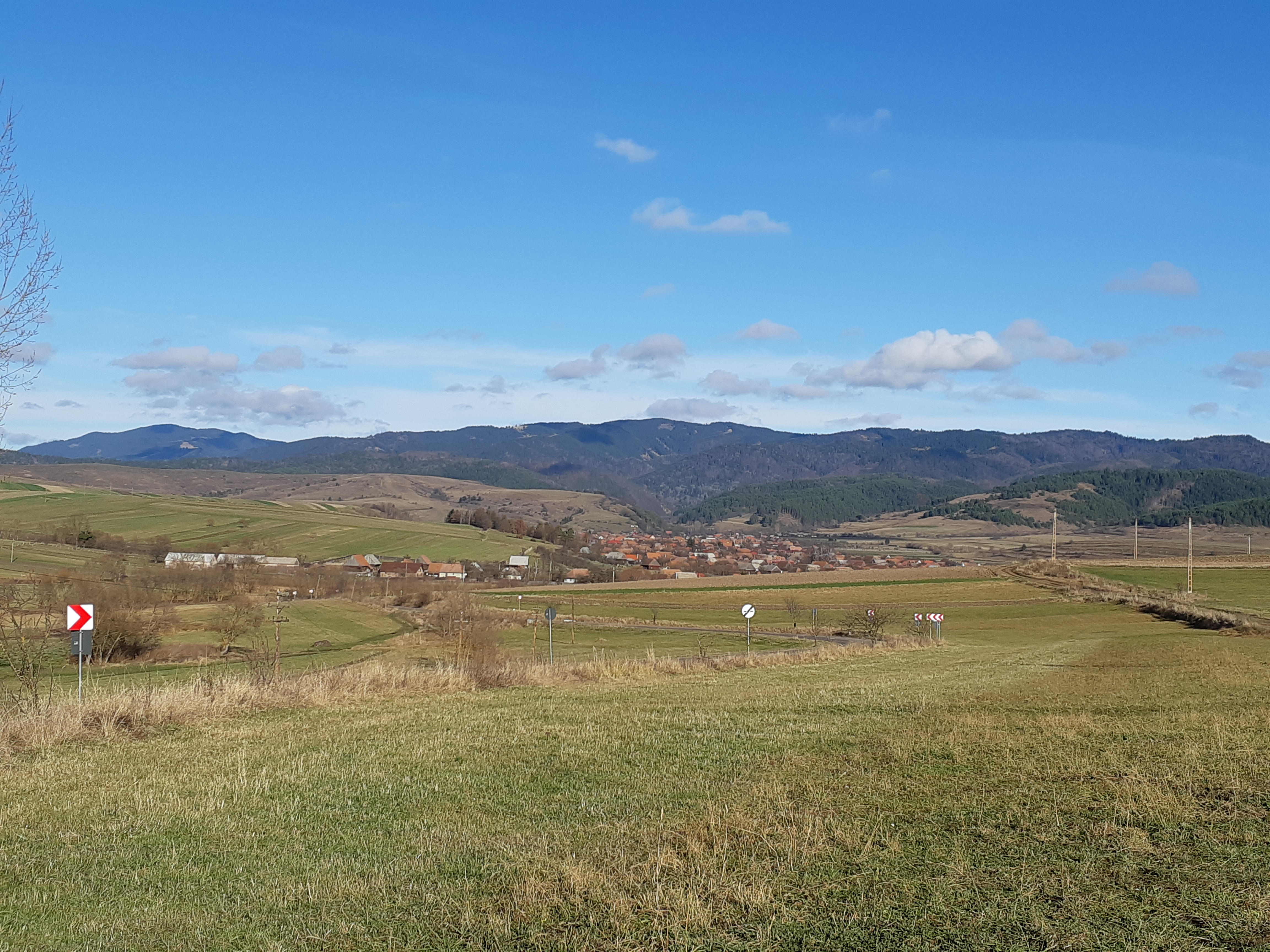 Depresiunea Caşin (Transilvania):Caşinul Nou dinspre Plăieşii de Jos